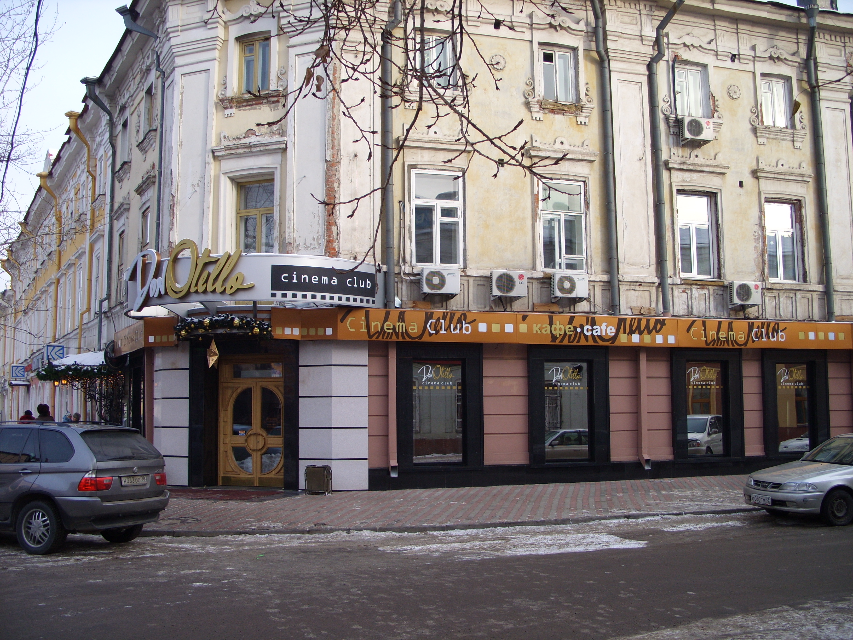 г. Иркутск, ул. Грязнова, 1